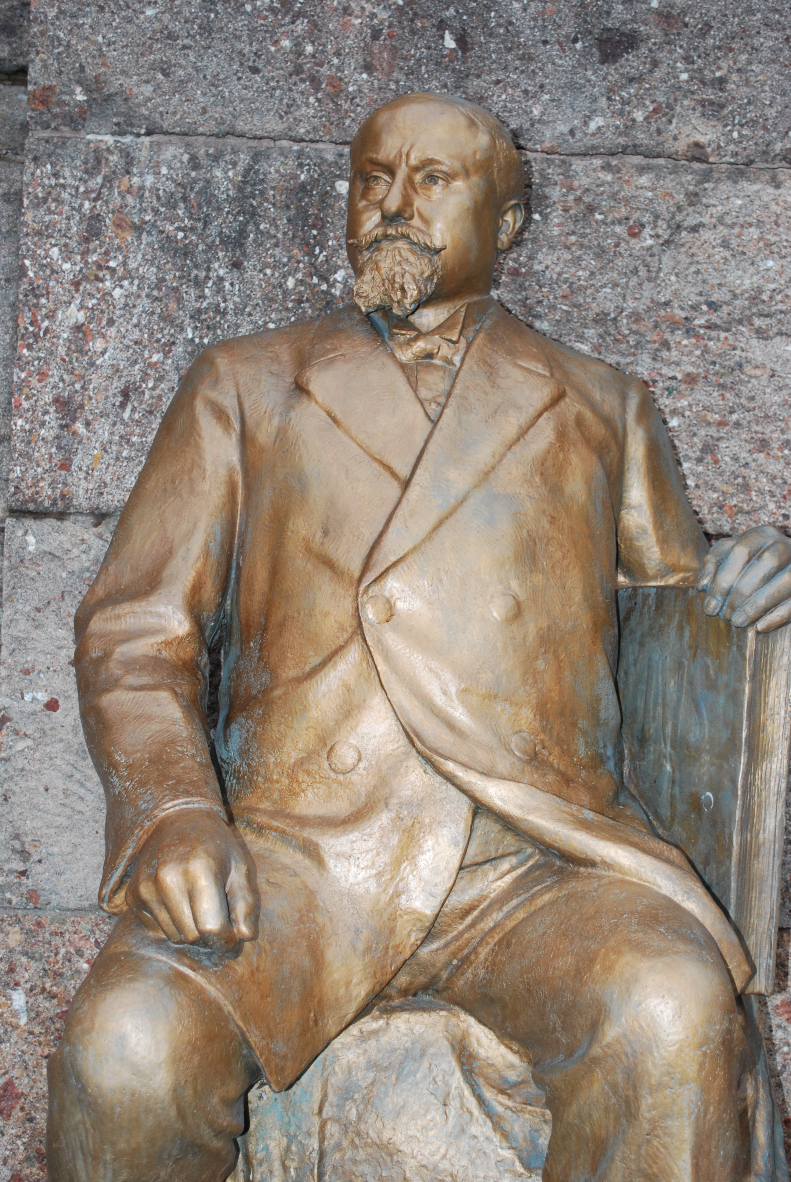 Statua di Emilio Bossi (Milesbo) - Bruzella